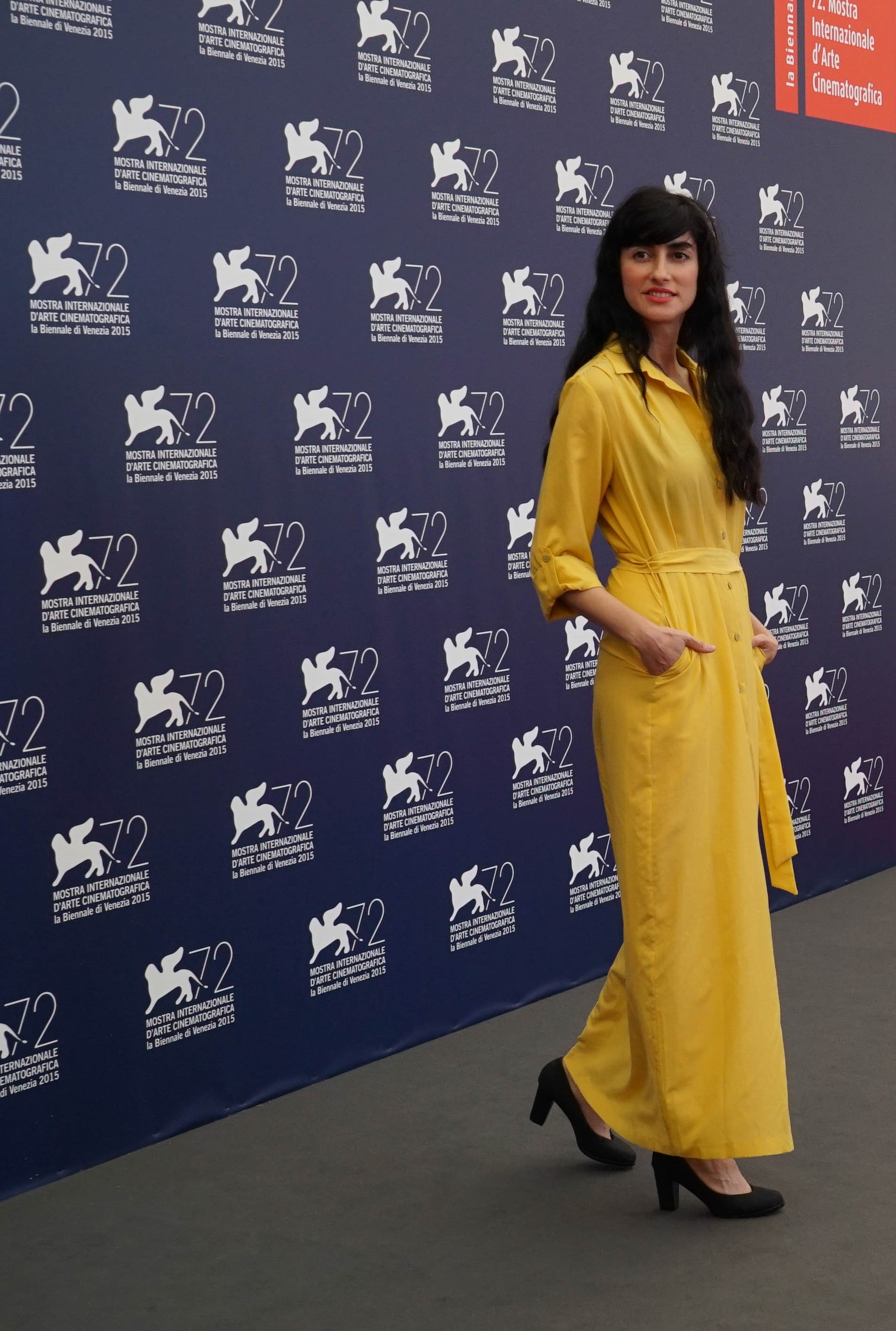 יעל קיים